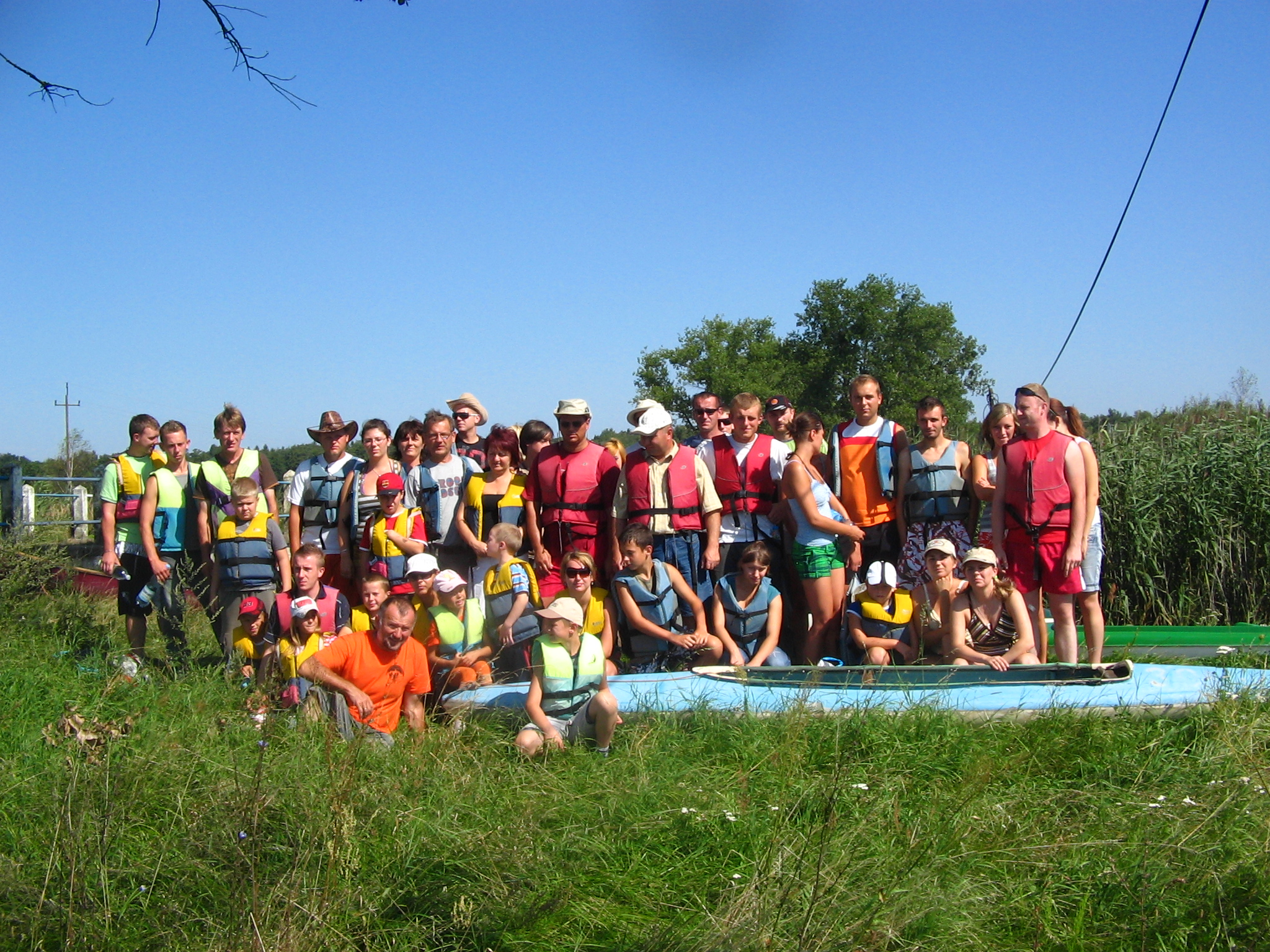 Spływ kajakowy Smortawą